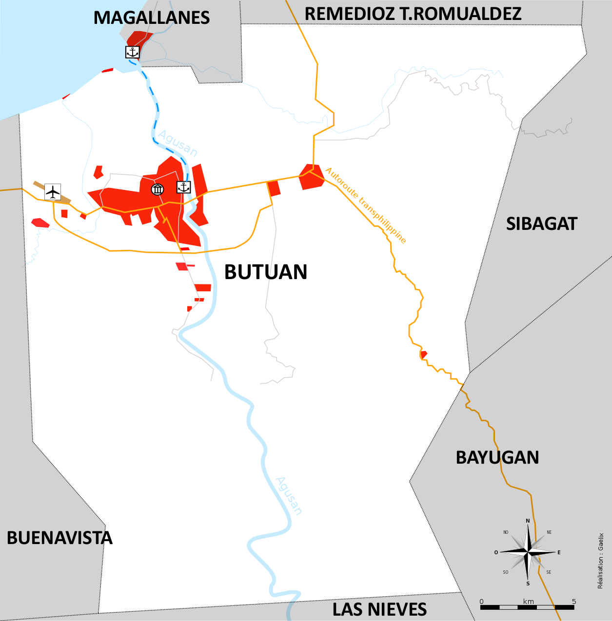 Carte des zones urbaines et des transports de Butuan